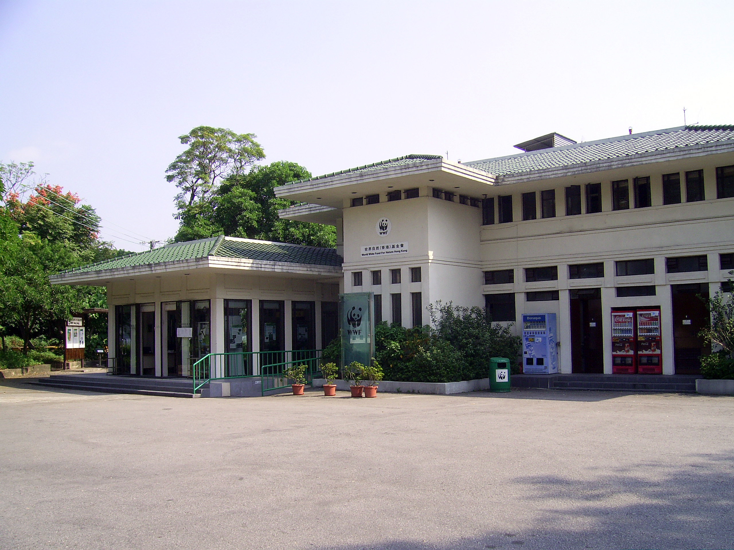 中文（香港）: 世界自然基金會香港分會米埔沼澤野生生物教育中心